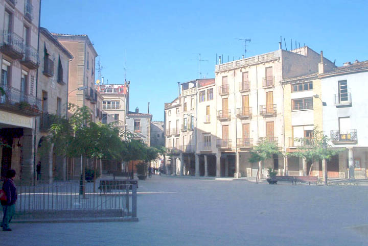 Santa Coloma de Queralt, Catalunya.